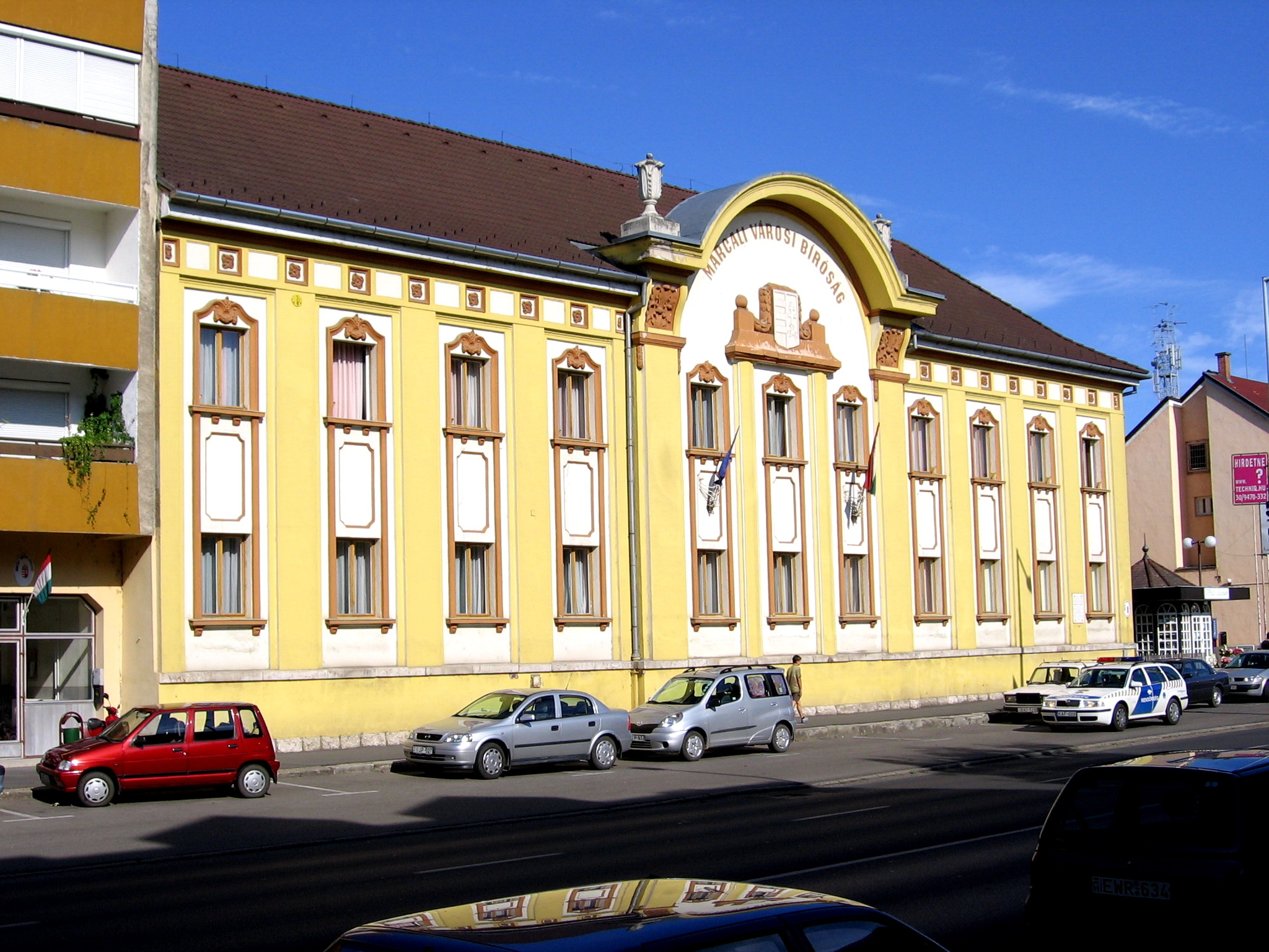 Városi Bíróság. - azonosító -2418